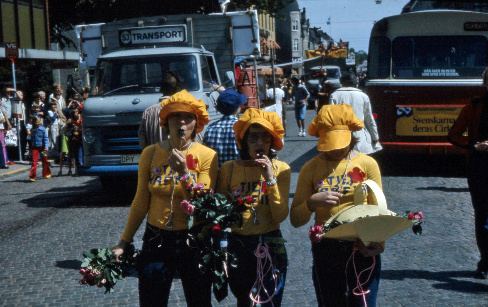 Teknikums årliga karneval lockade stora åskådarskaror till centrala Växjö en majlördag under 1960- till 1980-talen. Förutom karnevalsekipagen uppträdde blåsorkesteren Phontrattarne, Photo Teknikum spelade och man kunde köa examenstidningen Liggaren. Bilden är från någon av karnevalerna 1974- 1975 eller 1976.